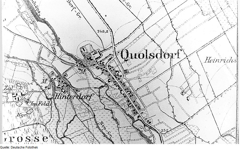 Original image description from the Deutsche Fotothek Hähnichen-Quolsdorf. Meßtischblatt, 1:25.000, Sekt. Rothenburg